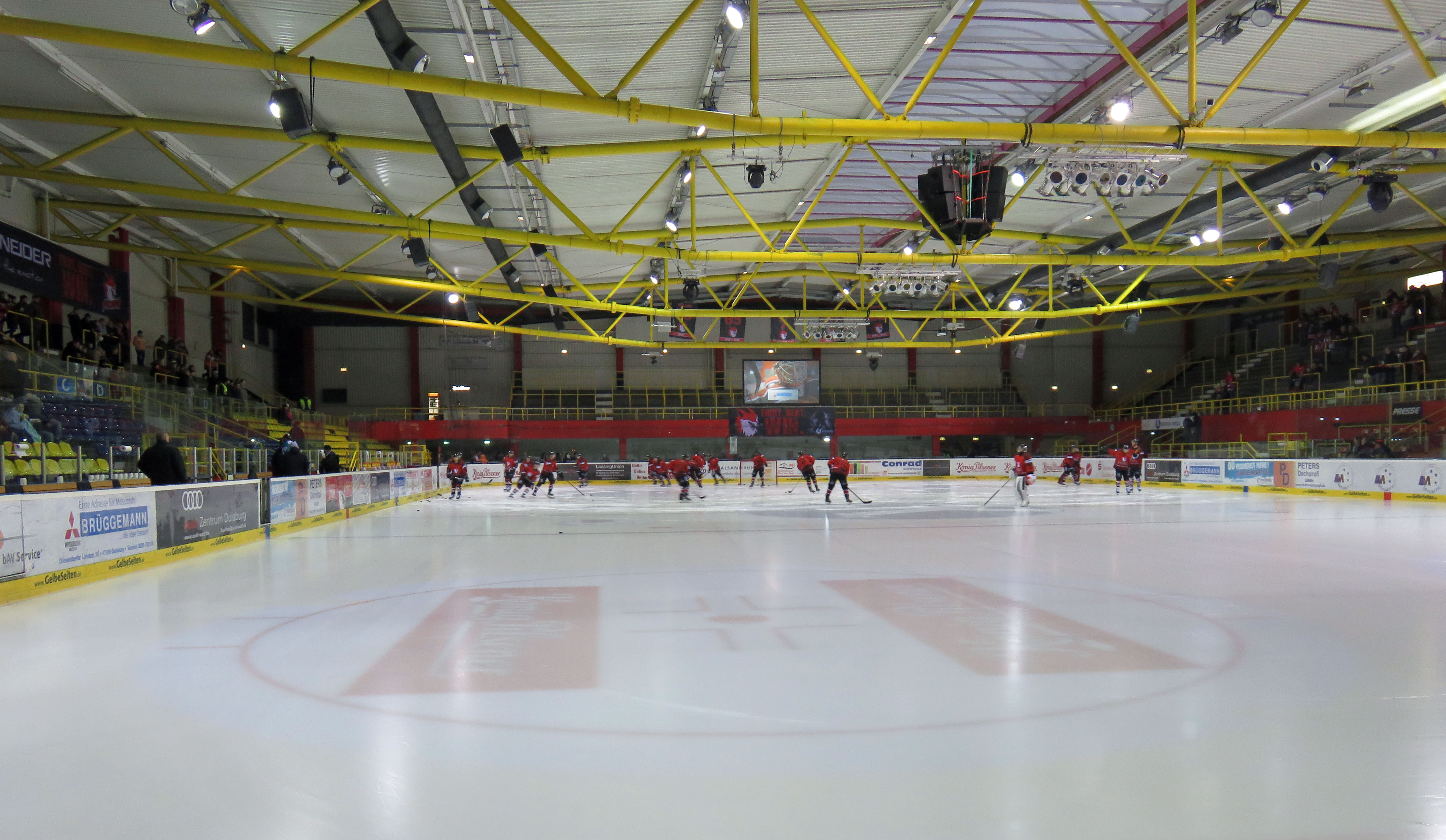 Kenston Arena (Eisfläche)